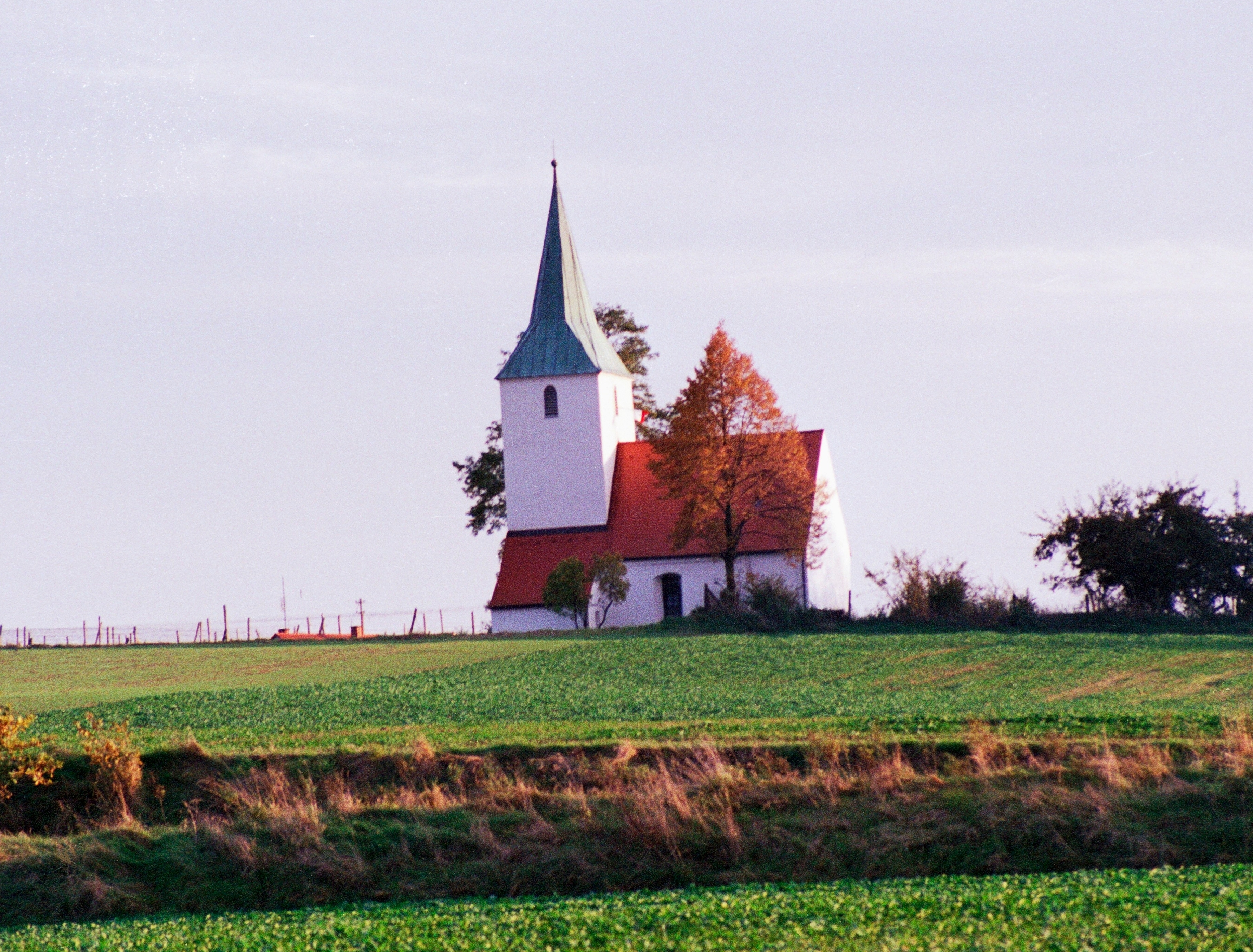 Neustadt an der Donau; Ortsteil Oberulrain: St. Achatius